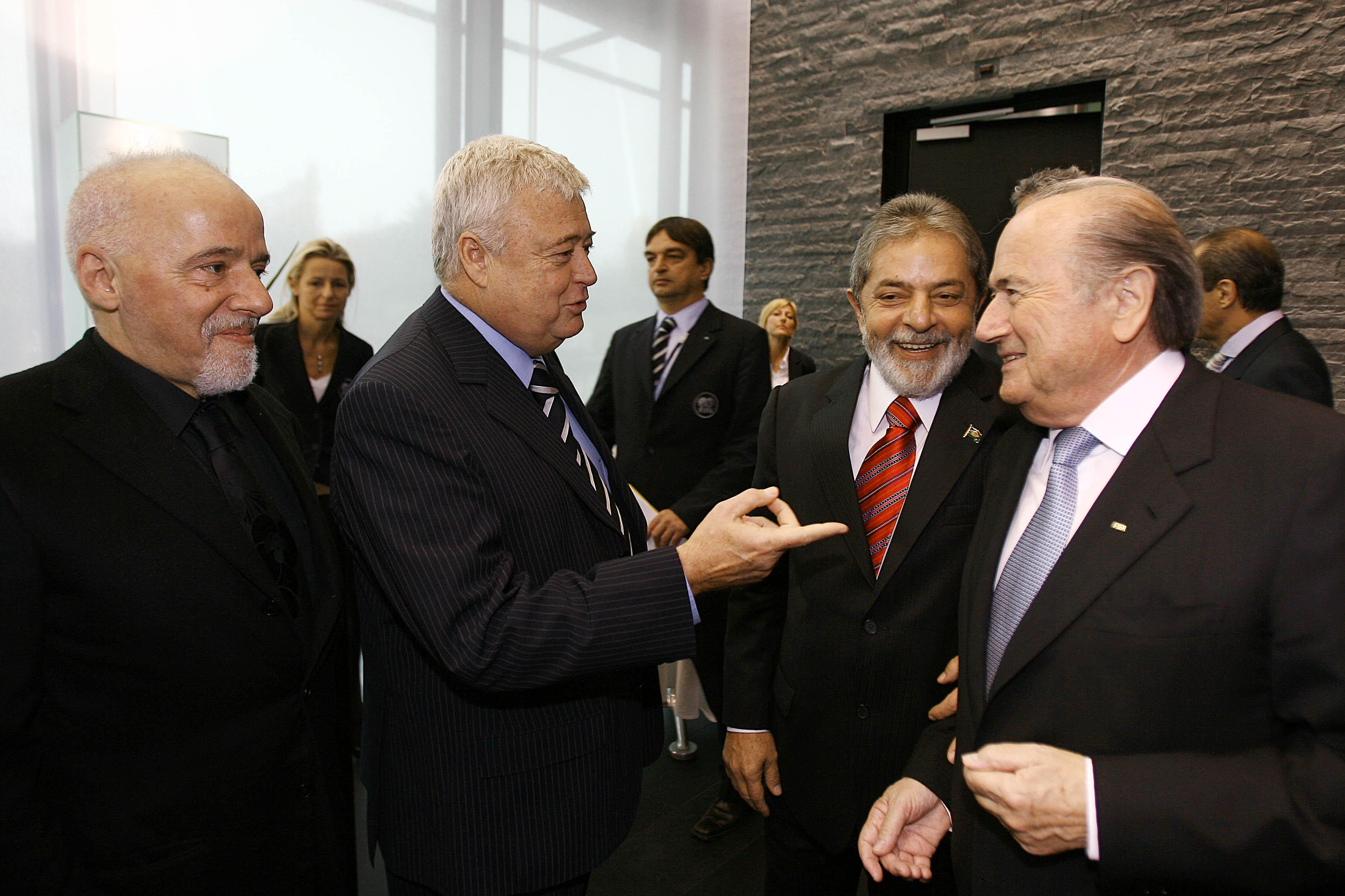 Zurique (Suíça) - O presidente Lula conversa com o presidente da Fifa, Joseph Blatter, ao lado do escritor Paulo Coelho e do presidente da CBF, Ricardo Teixeira, antes da cerimôniaque anunciou a sede da Copa de 2014.